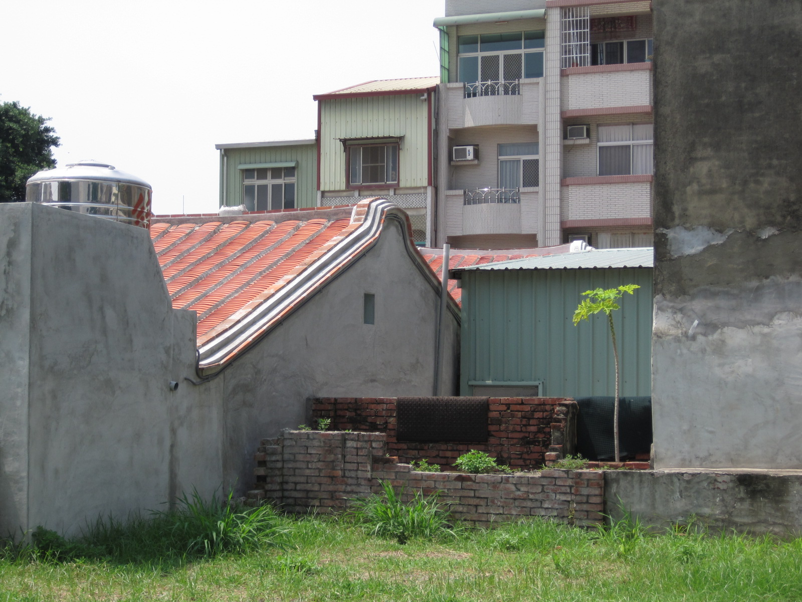 臺南市原安平陳保正厝